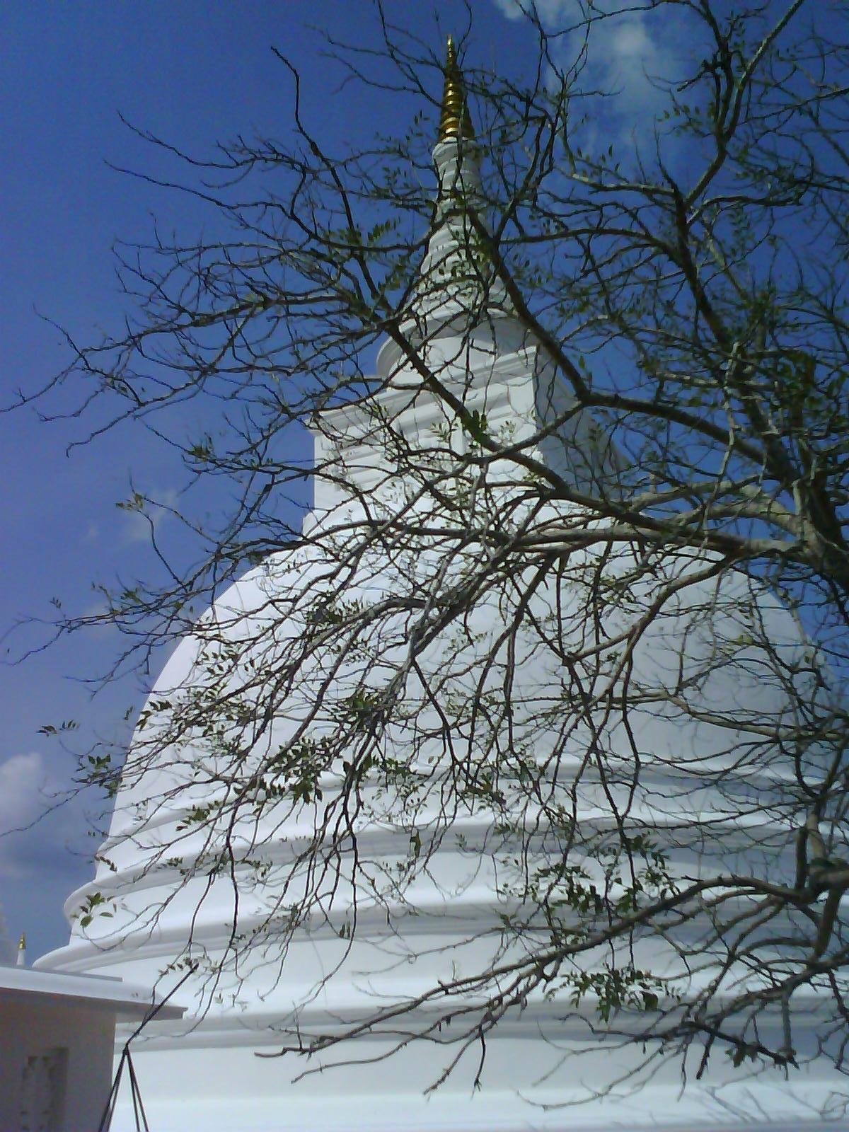 Buddhist Stupa at Thanthirimale Raja Maha Vihara in Anuradhapura District of Sri Lanka.